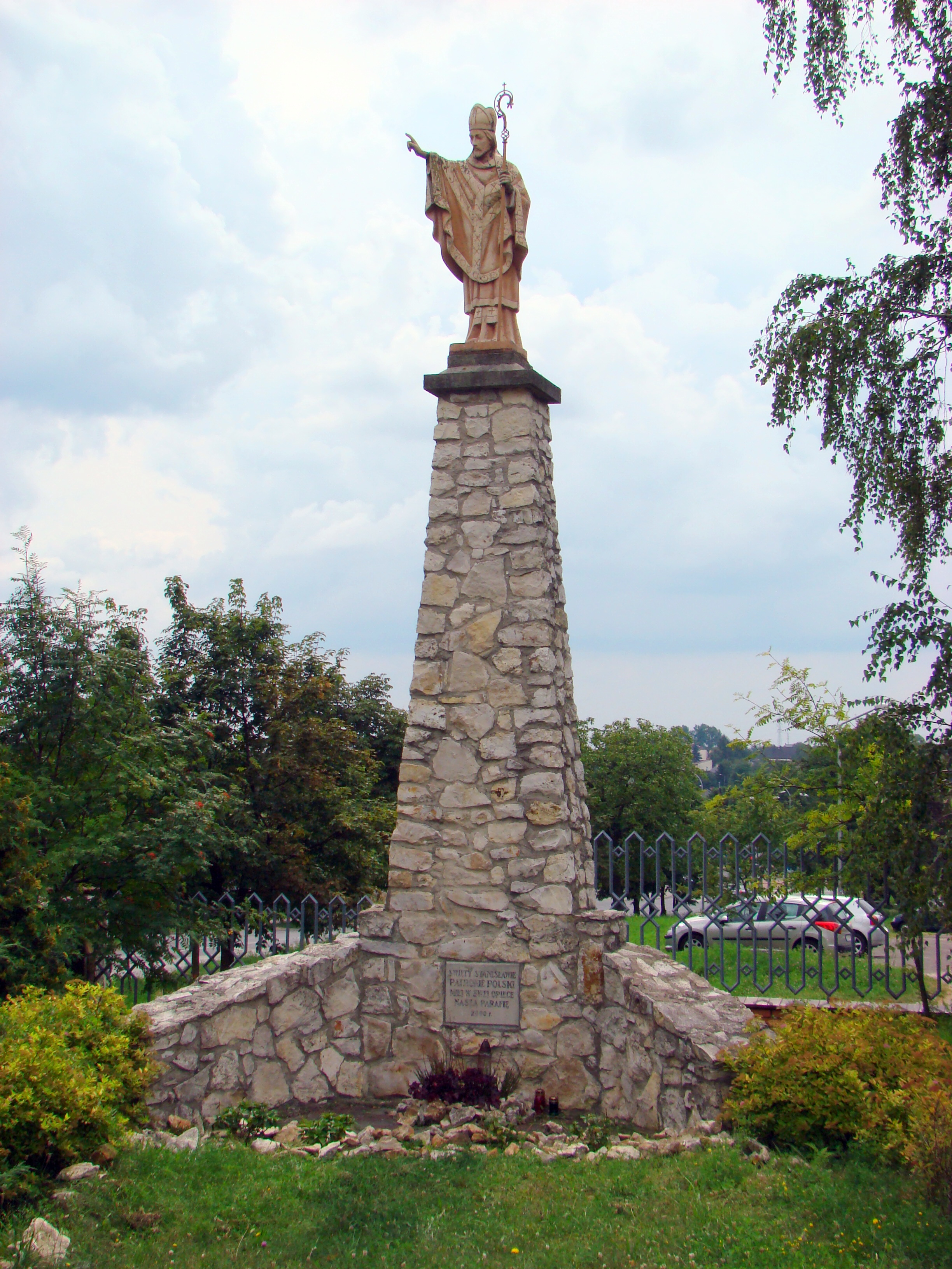 Parafia Świętego Stanisława Biskupa i męczennika w Częstochowie, figura Świętego Stanisława z 2000 roku.